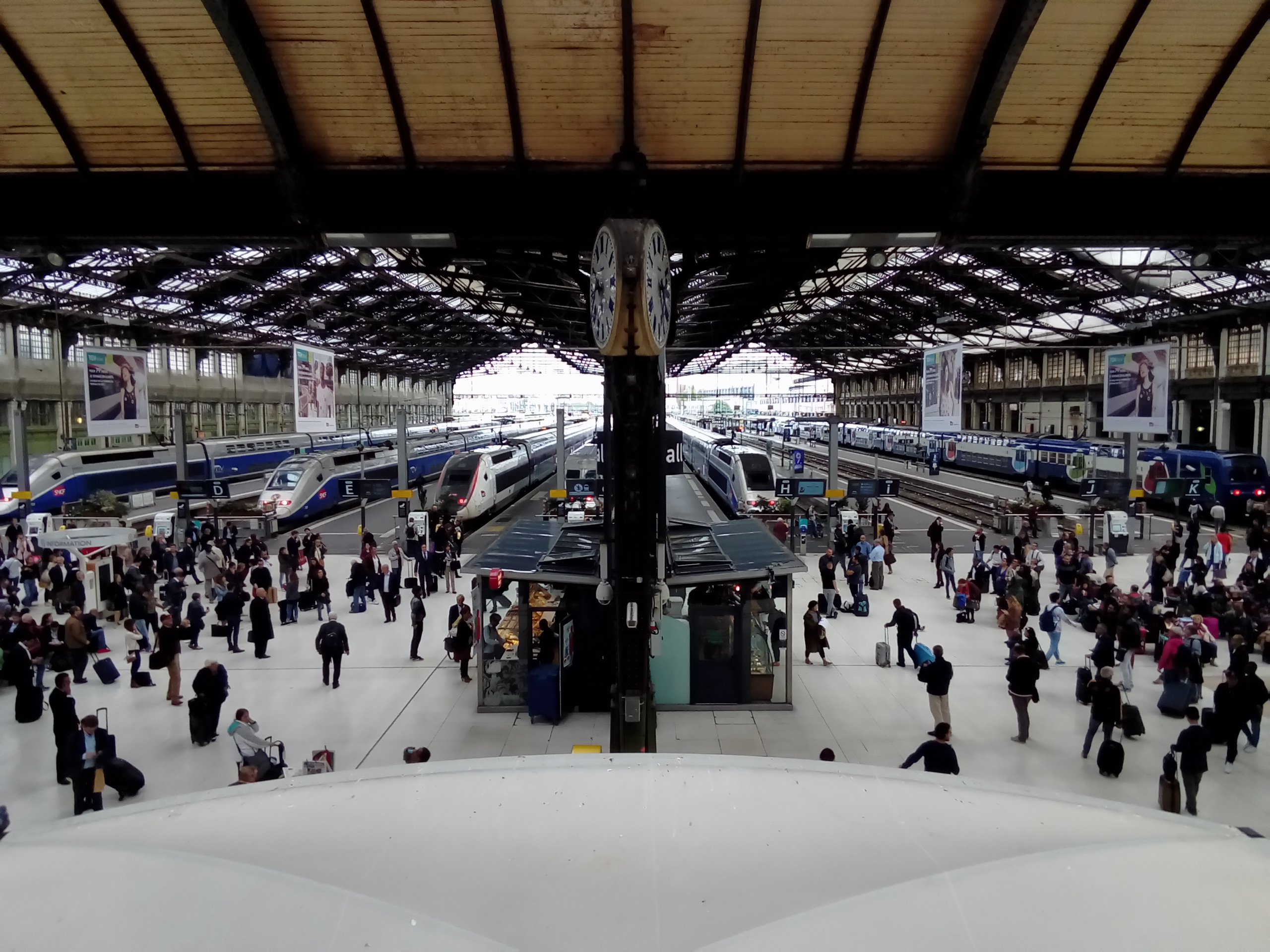 Le hall principal de la gare vue frontalement depuis le balcon.